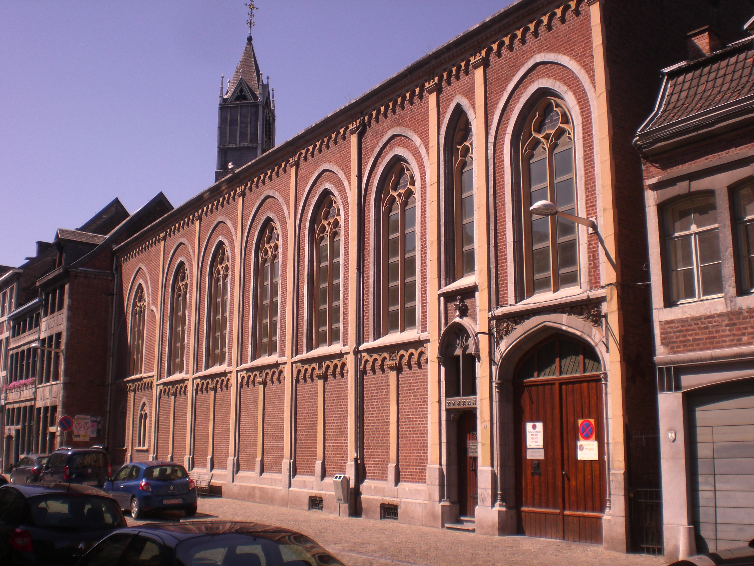 Eglise Sainte-Croix Hors-Château